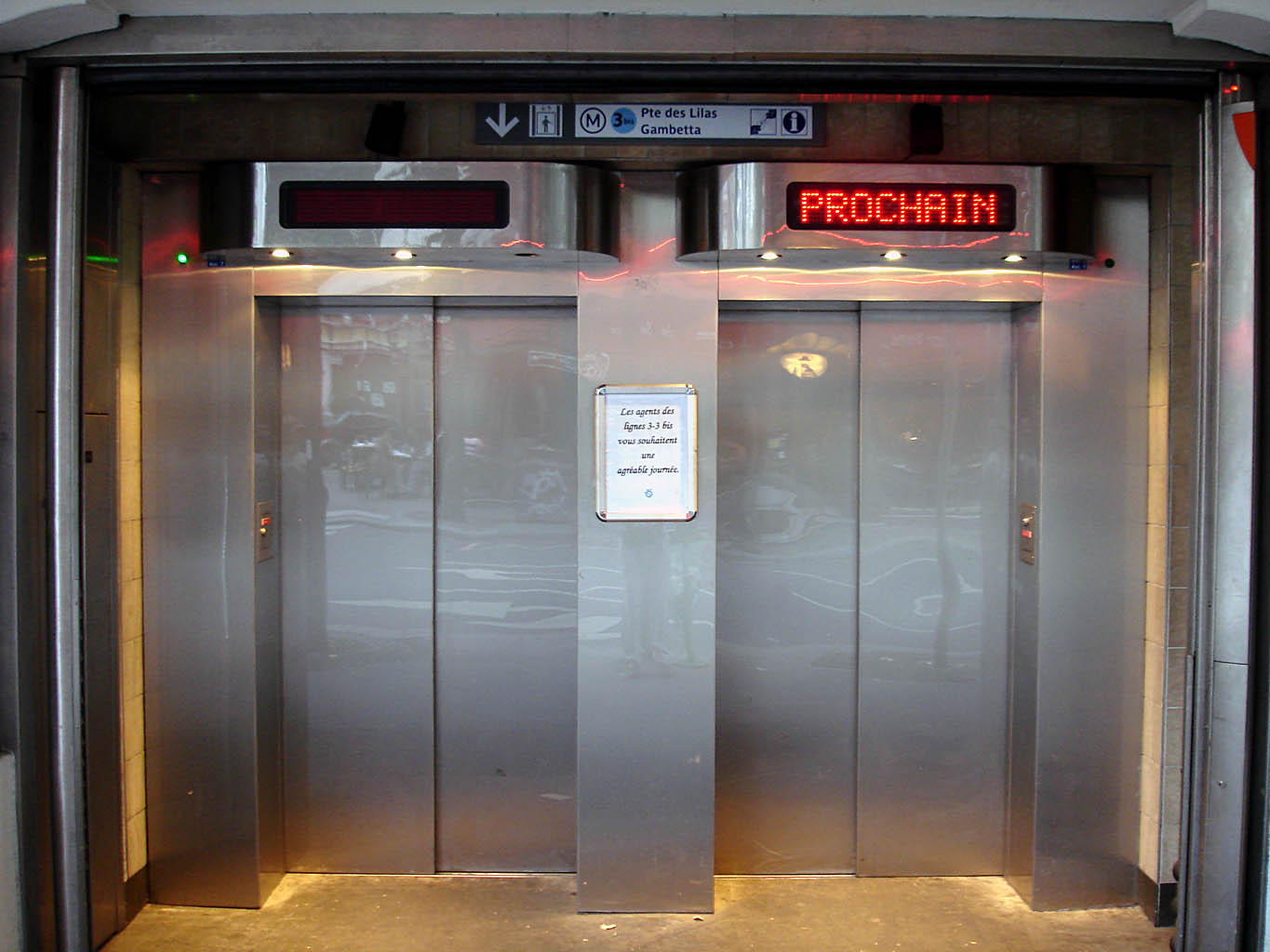 Station Pelleport de la ligne 3bis du métro de Paris, France